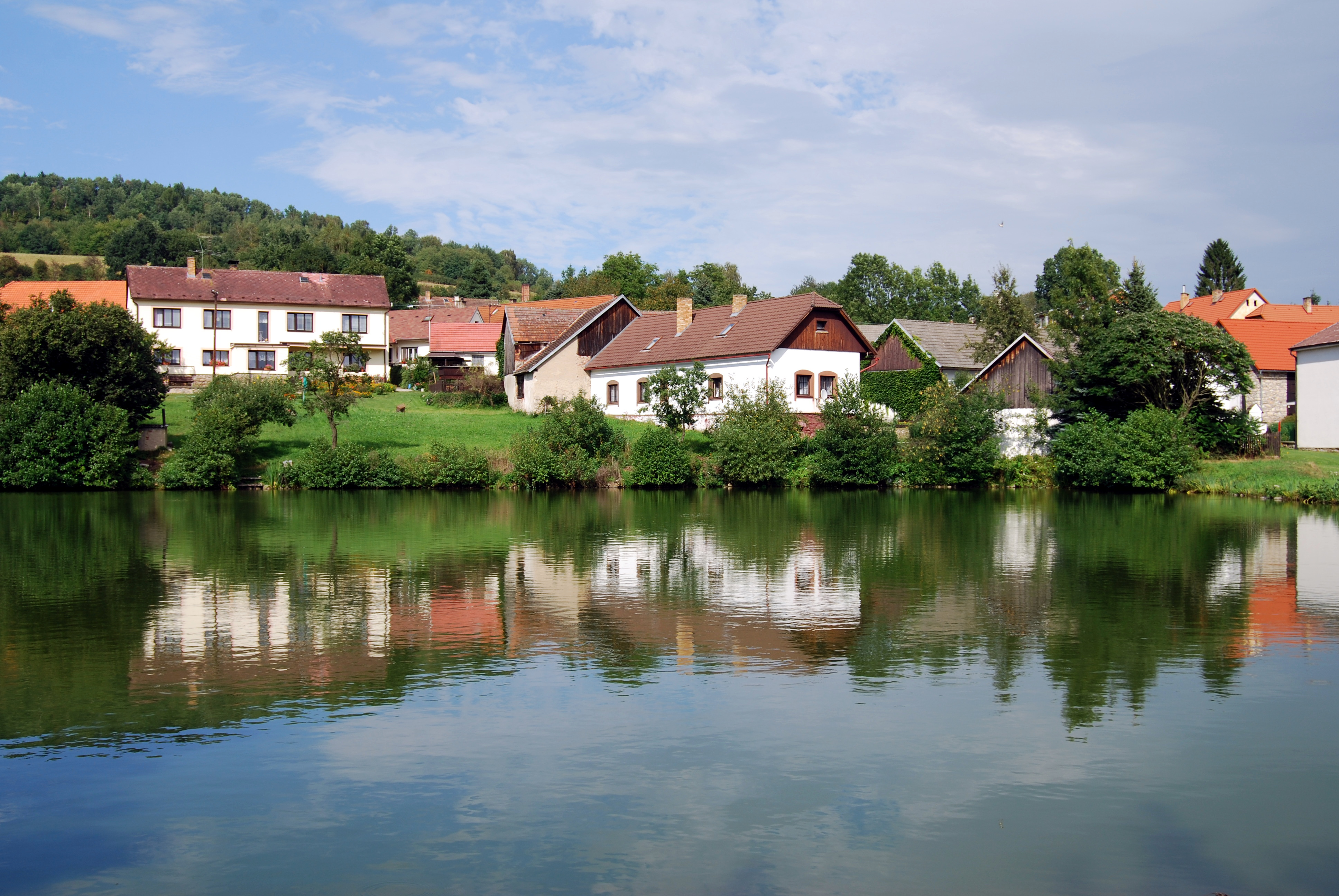 Pohled na návesní rybník a část obce. Vlksice (okres Písek). Česká republika.